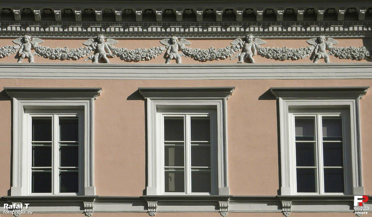 Fragment elewacji drugiego piętra.